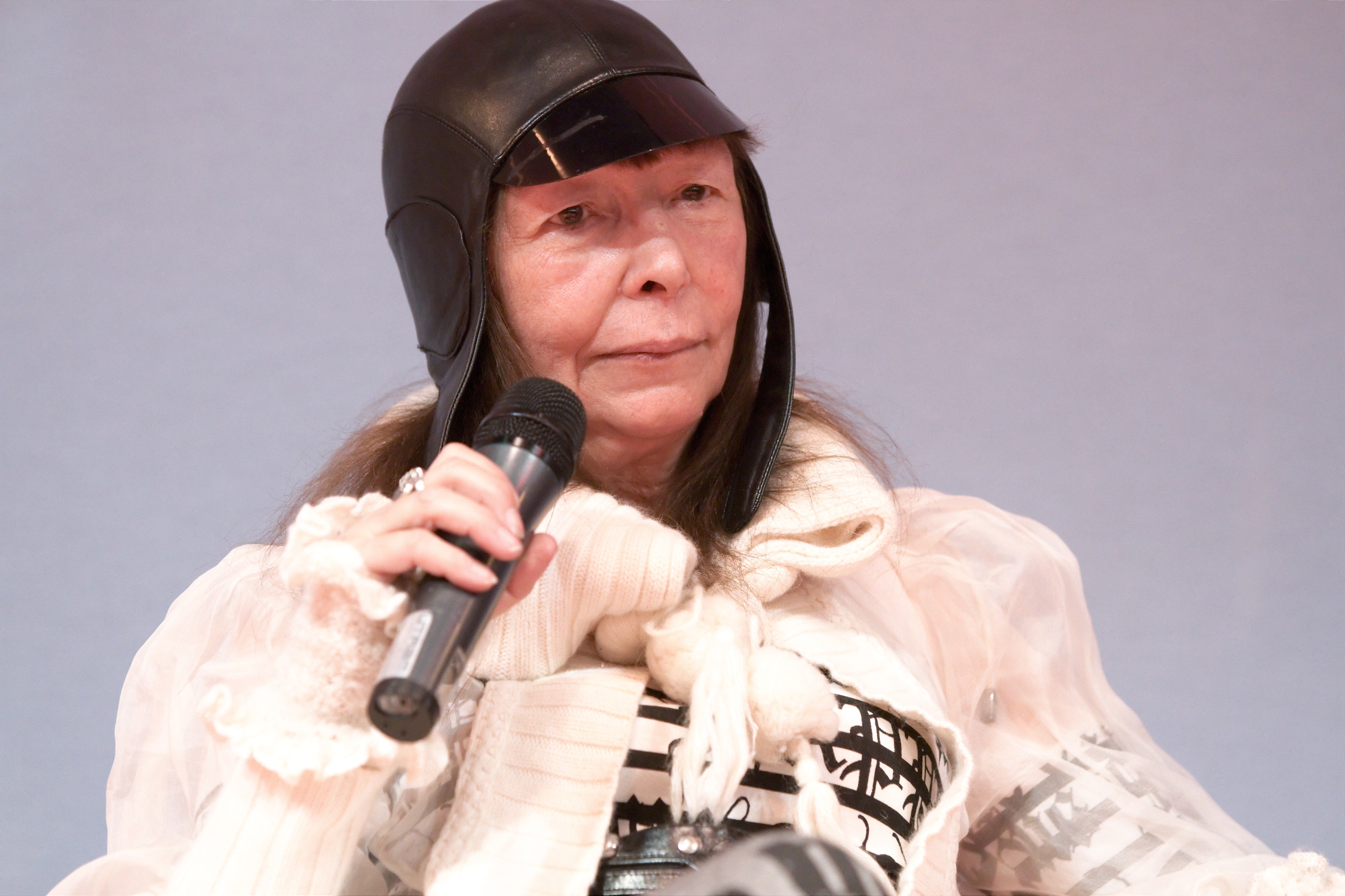 Brigitte Fontaine au Salon du livre de Paris pour une lecture de quelques-uns de ses poèmes.